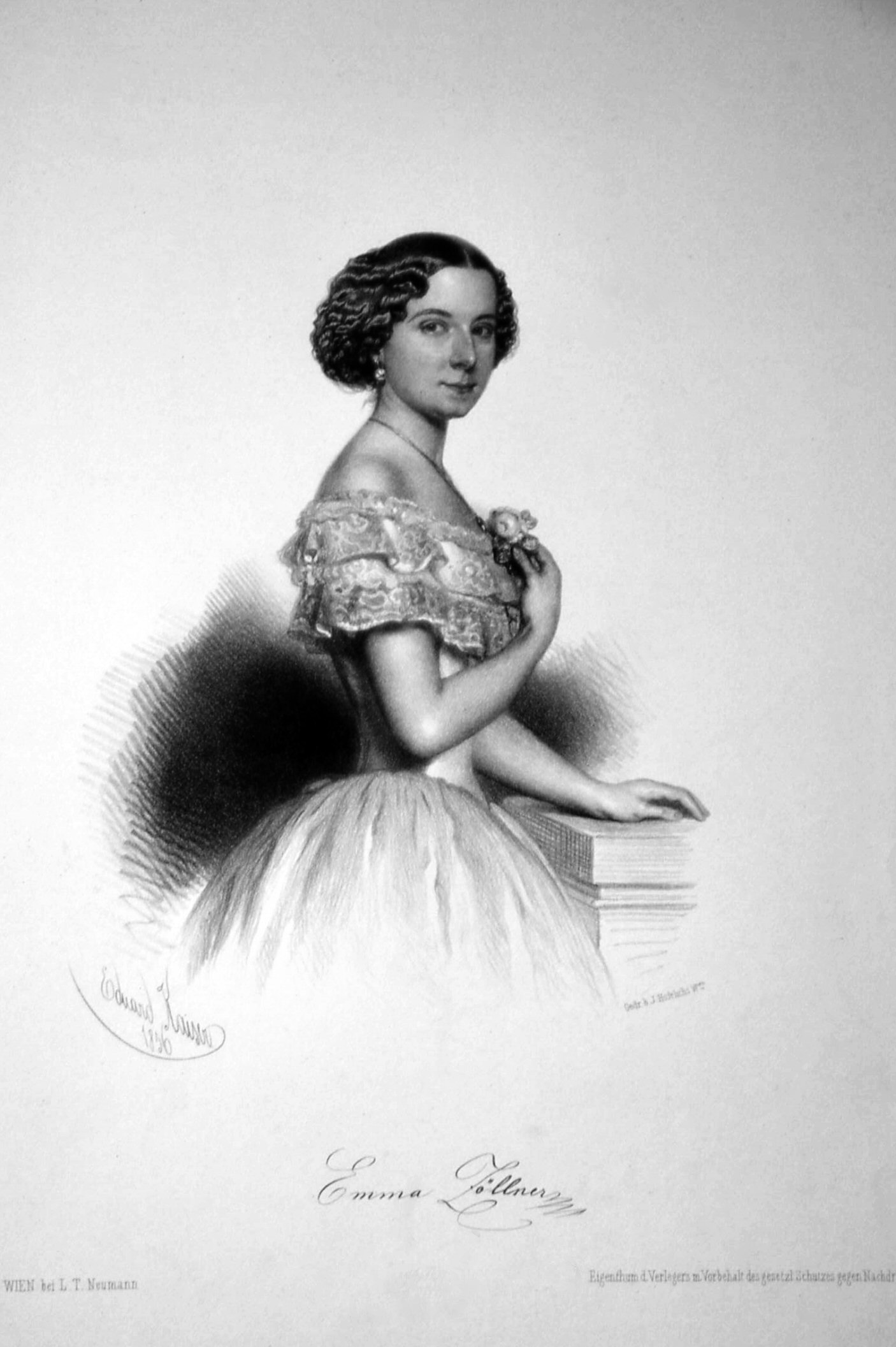 Emma Zöllner (1827-1910), Sängerin, Soubrette, Lithographie von Eduard Kaiser, 1856.